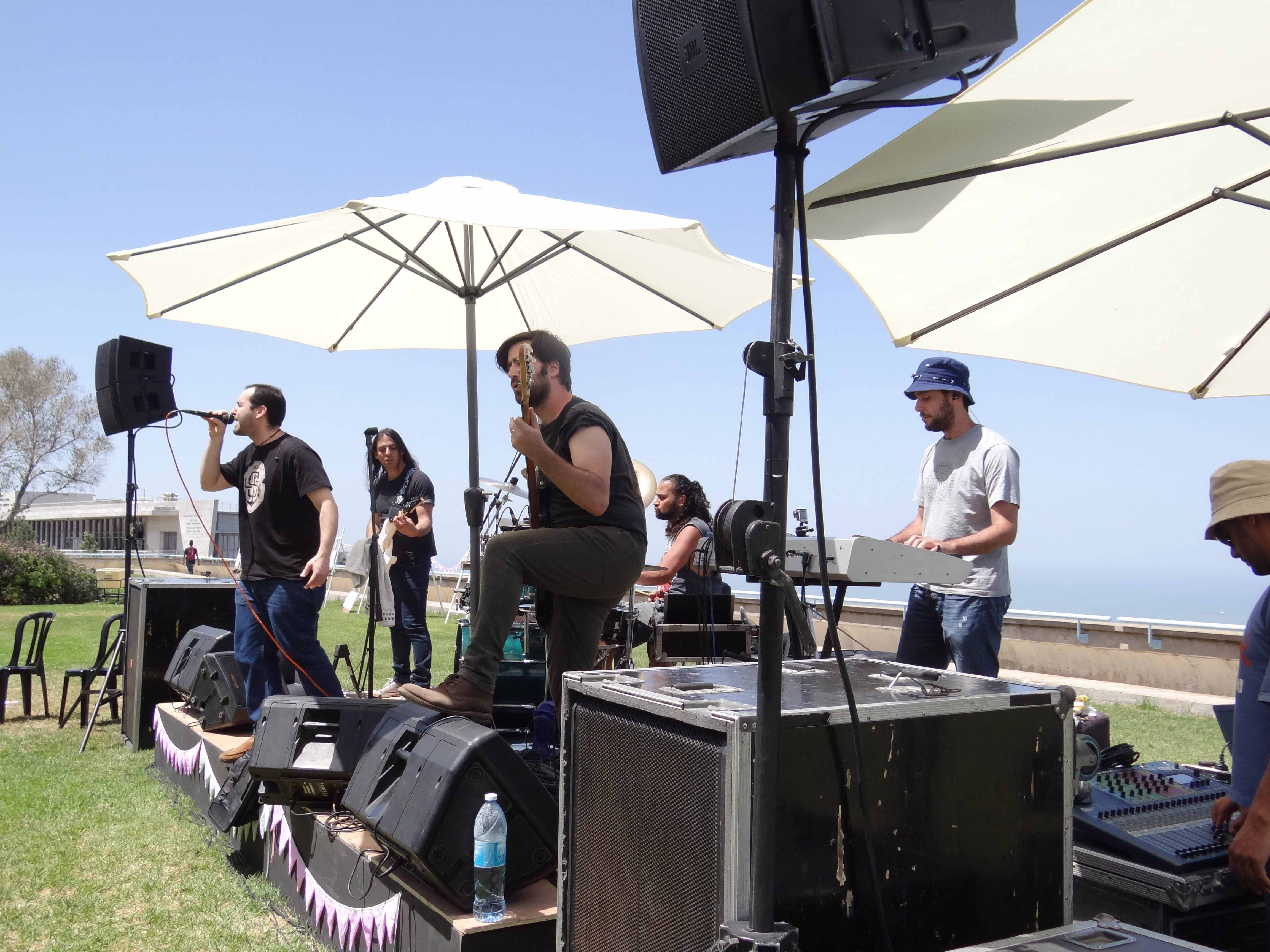 להקת מטאל ישראלית Edgend חברי הלהקה הם: שרון הלחמי - גיטרה, דוד עזוז - קלידים, בן מטאל - בס, רפאל חברוני - תופים ואלכס לינזקי - שירה במופע פסטיבל אביב במוזיאון הכט באוניברסיטת חיפה